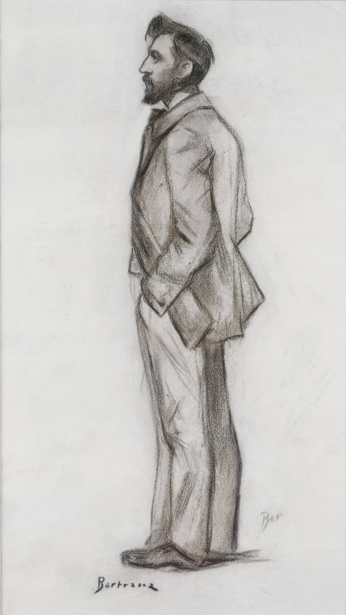 Retrat a llapis de Rafael masó fet per Prudenci Bertrana